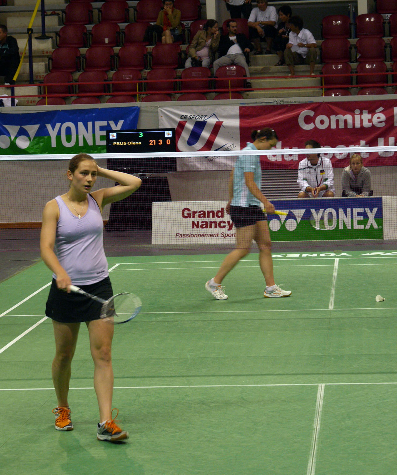 Elena Prus and Kim Buss